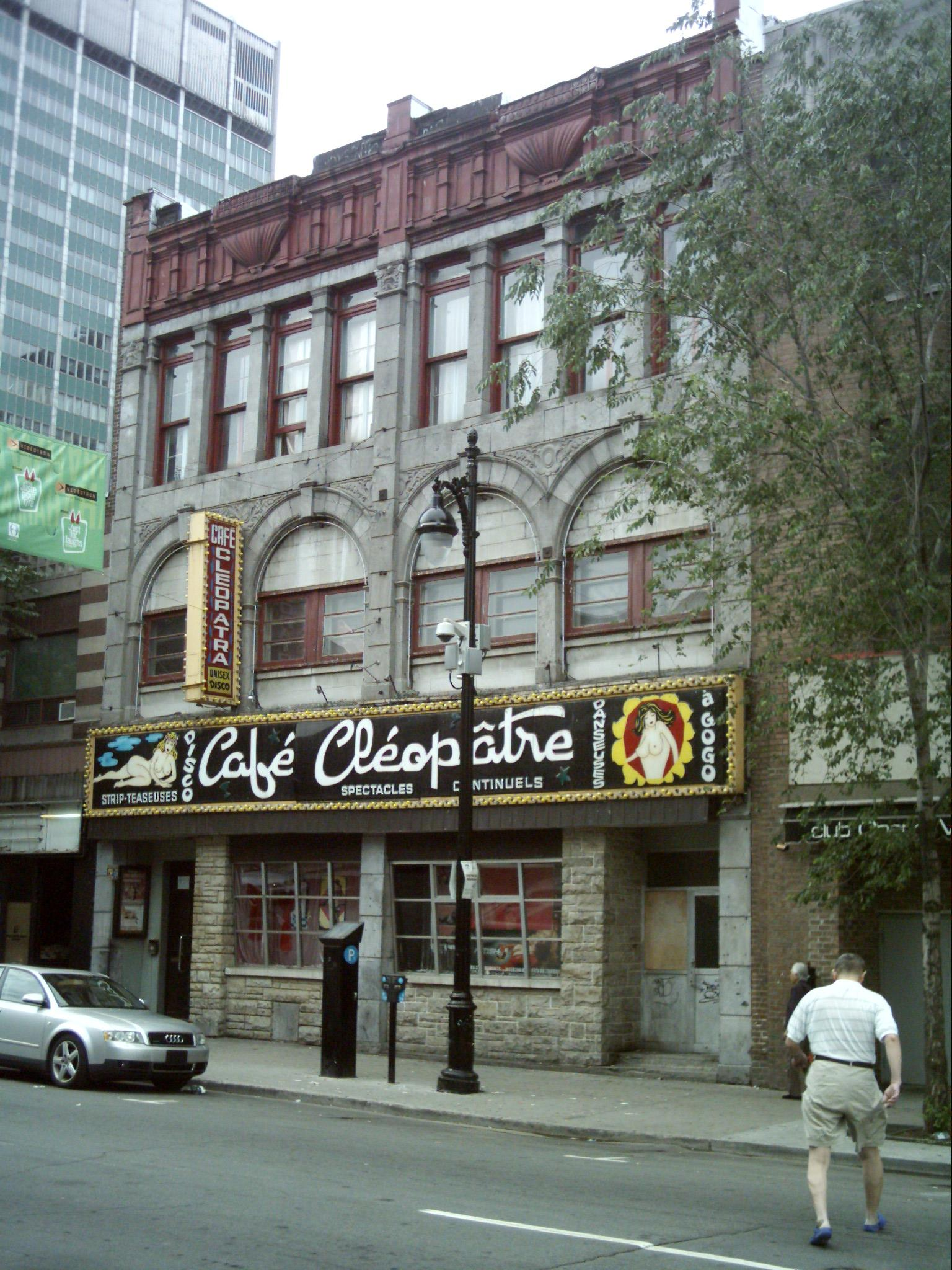 De l'ancien Red light de Montréal, le Café Cléopâtre est l'un des derniers souvenirs existants.